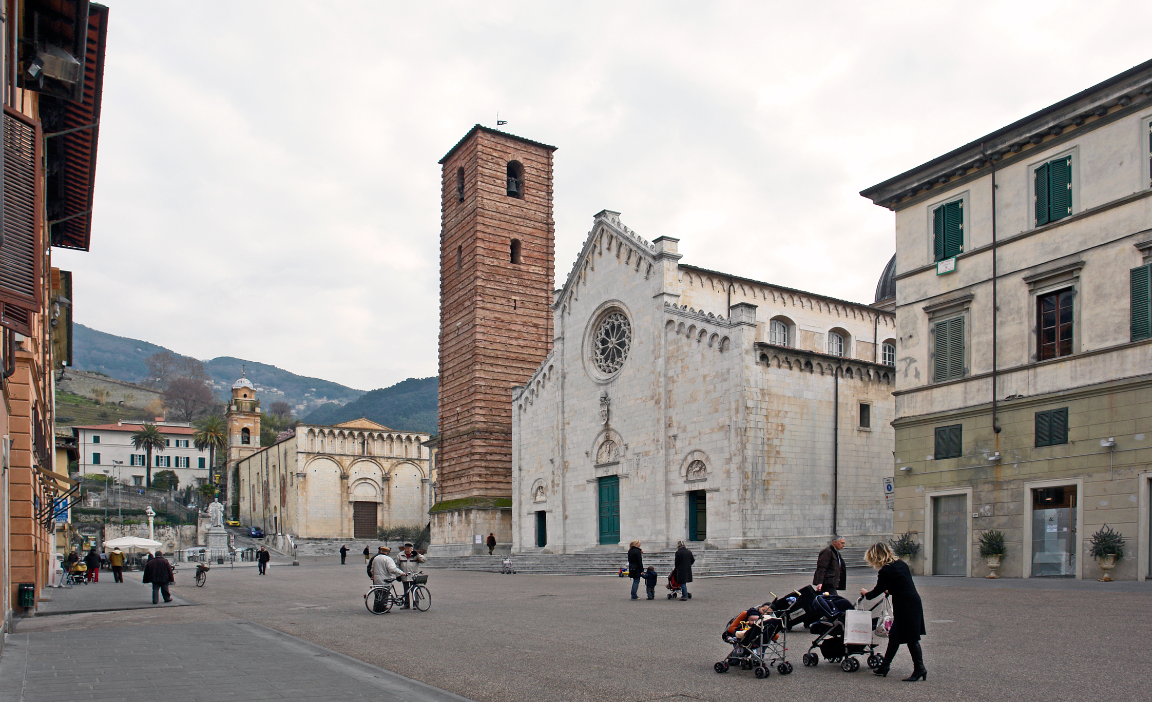 Pietrasanta, Domplatz